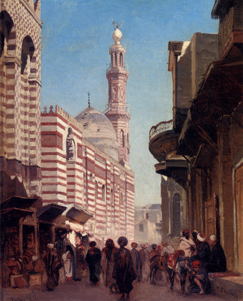 Cairo (Kair)